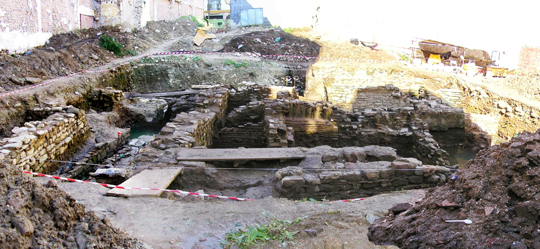 Excavaciones arueológicas en la Calle Panadería de Algeciras en 2006 Fotografía de realización propia, año 2006.